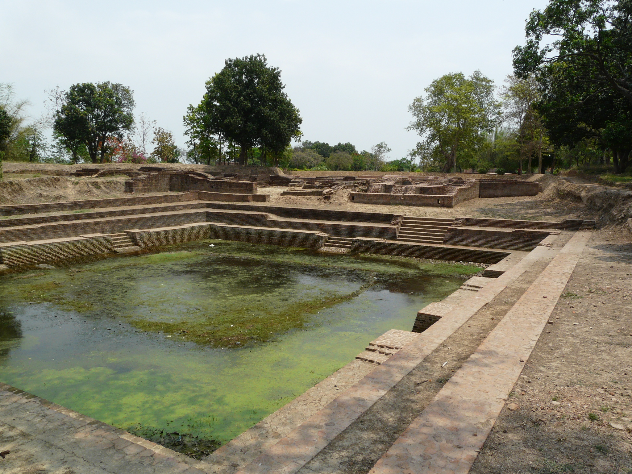 Temple and water tank Jetavana, Shravasti, Uttar Pradesh, India